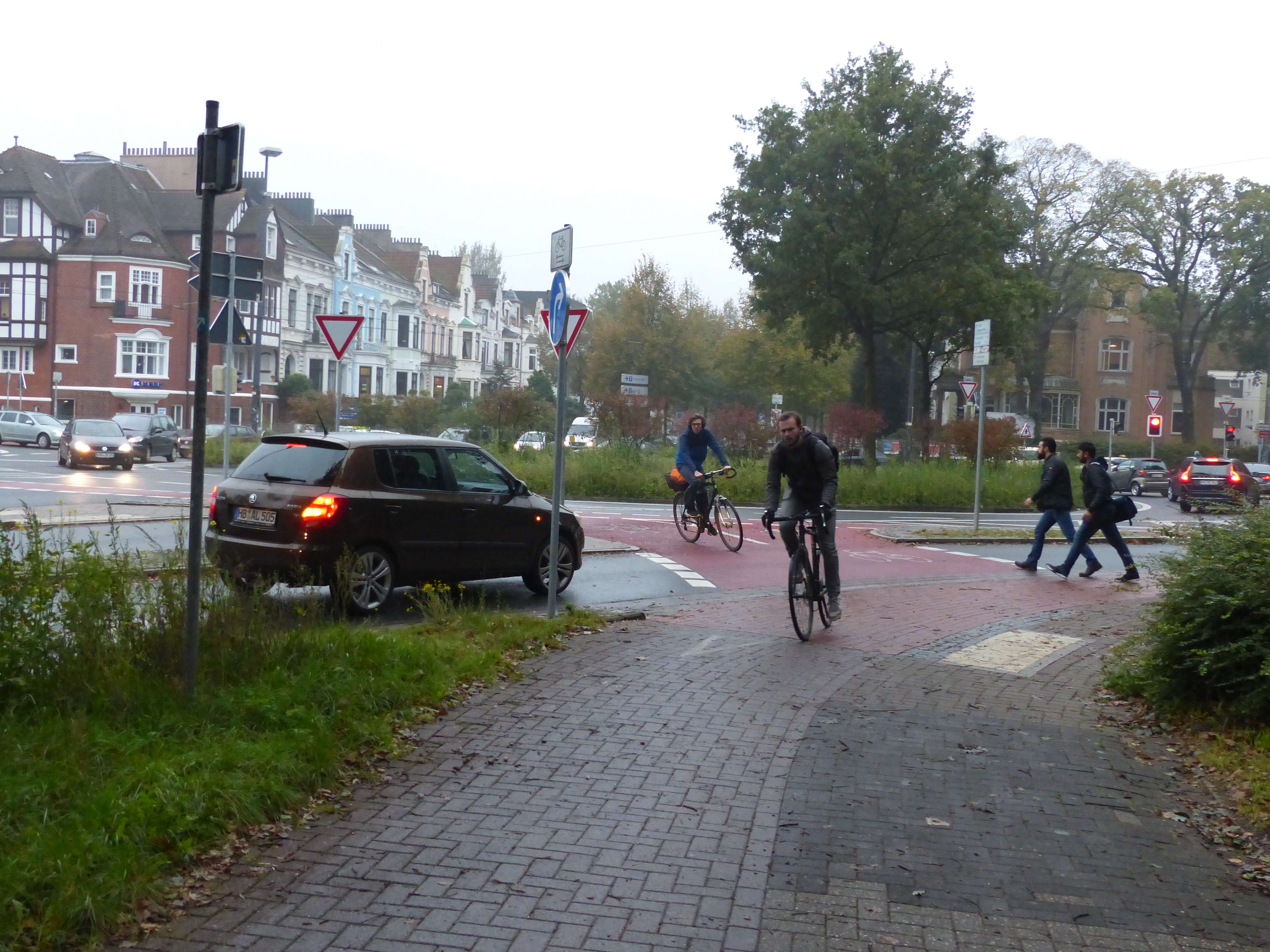 De-Facto-Kreisverkehr Am Stern in Bremen seit dem Umbau im Sommer 2017: An der Einmündung der (äußeren) Parkalle verbindet eine Zweirichtungsfurt den parkseitigen Radweg der Parkallee, der sich eingige Meter weiter in den parkseitigen Geh-und-Radweg der Hollerallee fortsetzt mit dem Fahrradring und kreuzt dabei den KFZ-Bypass von der Parkallee zur Hollerallee, der an der außenseite des Fahrradrings geführt ist. Die rote Einfärbung der Verbindungsfurt zeigt deren Vorrang an. Am Übergang des rechten Fahrstreifens der Parkallee in den Bypass steht ein Rechtsabbiegegebot (Zeichen 209). Darüber ist das Zusatzzeichen angebracht, das auf die bevorrechtigte Zweirichtungsfurt hinweist. Dass Zeichen 205 (Vorfahrt gewähren) hier eingespart wurde, während es am linken Fahrstreifen, der in den Kreisel mündet, doppelt steht, befremdet. Denn die durch das angeordnete Rechtsabbiegen der KFZ bevorrechtigte Fahrradfurt imponiert nicht wie die Einbeziehung einer Radverkehrsanlage in das Vorfahrtsrecht einer parallelen Fahrbahn. Zudem steht in der Nähe der Radwegeinmündung ziemlich weit rechts ein kleines Zeichen 205, bei dem mangels Wartelinie nicht ganz klar ist, wessen Vorfahrt Radler aus dem Radweg der Parkallee alles achten sollen. Das ist zwar formell letztlich korrekt, erfordert aber sehr verwinkelte Gedankengänge an diesem oft sehr stark frequentierten Verkehrsknoten, an dem das komplexe Verkehrsgeschehen selber die ganze Aufmerksamkeit der Verkehrsteilnehmer beansprucht.